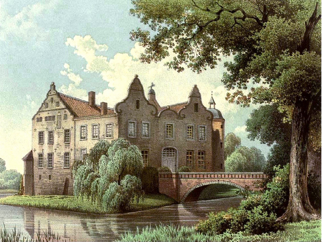 Rittergut Erprath, Kreis Moers, Rheinprovinz, Lithografie aus dem 19. Jahrhundert